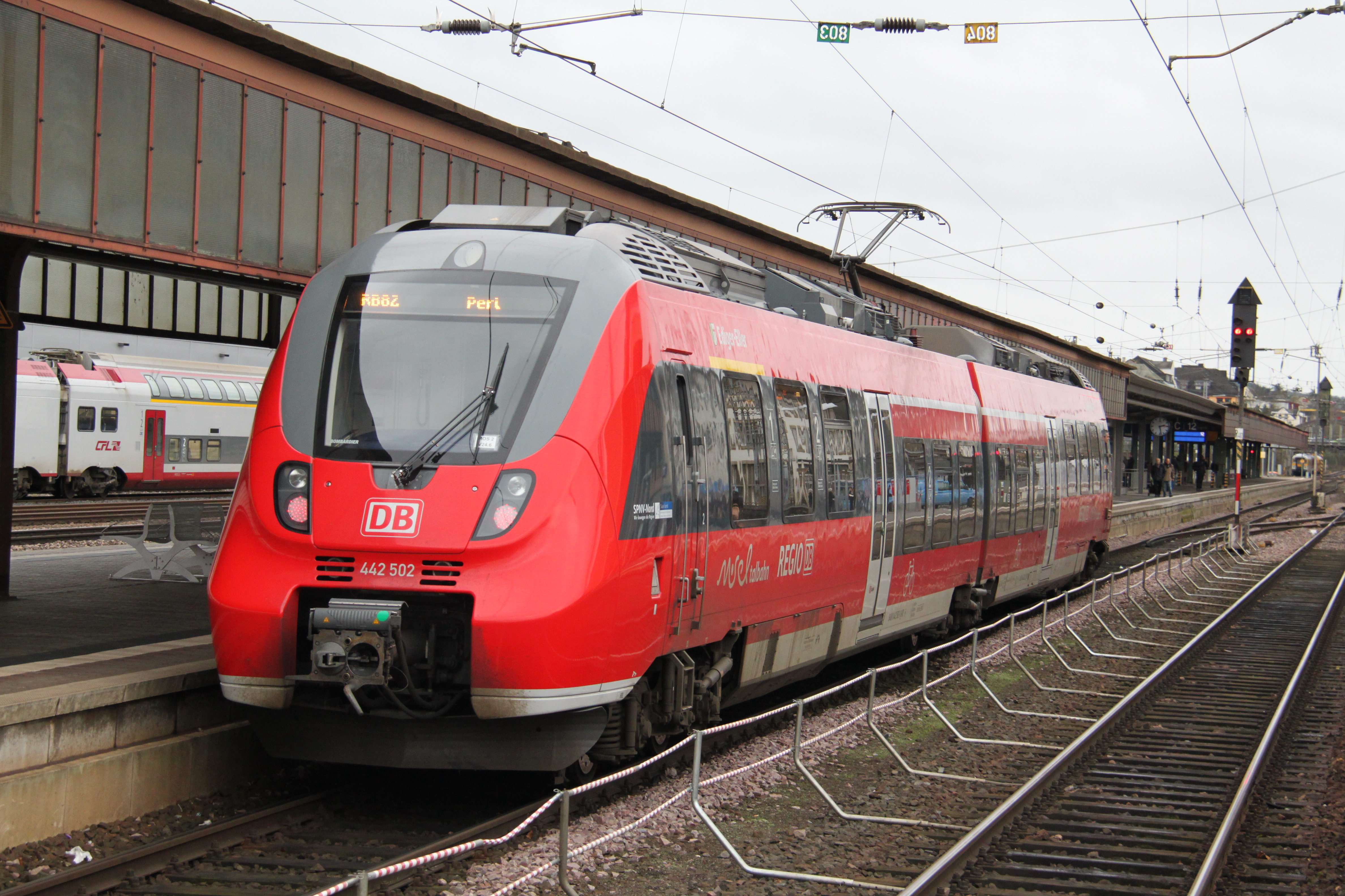 Een treinstel serie 442 in het station van Trier.